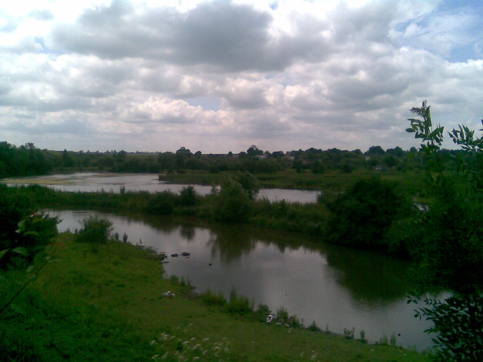 Stawy w Hlibowie